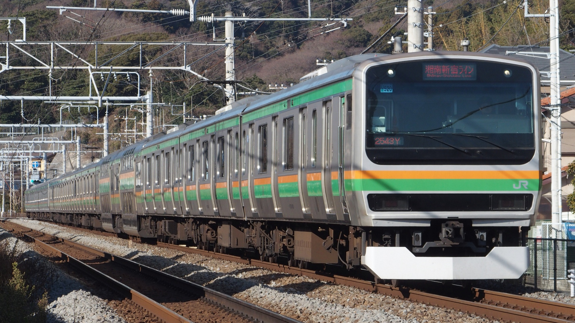 鎌倉～逗子間にてTJ高坂が撮影。